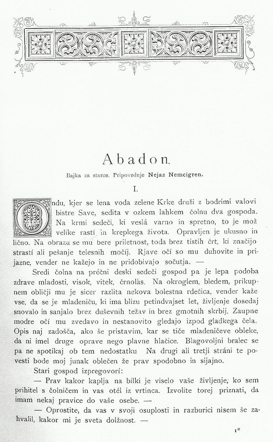 Preskenirana prva stran romana Abadon, objavljenega v Ljubljanskem zvonu, 1893.